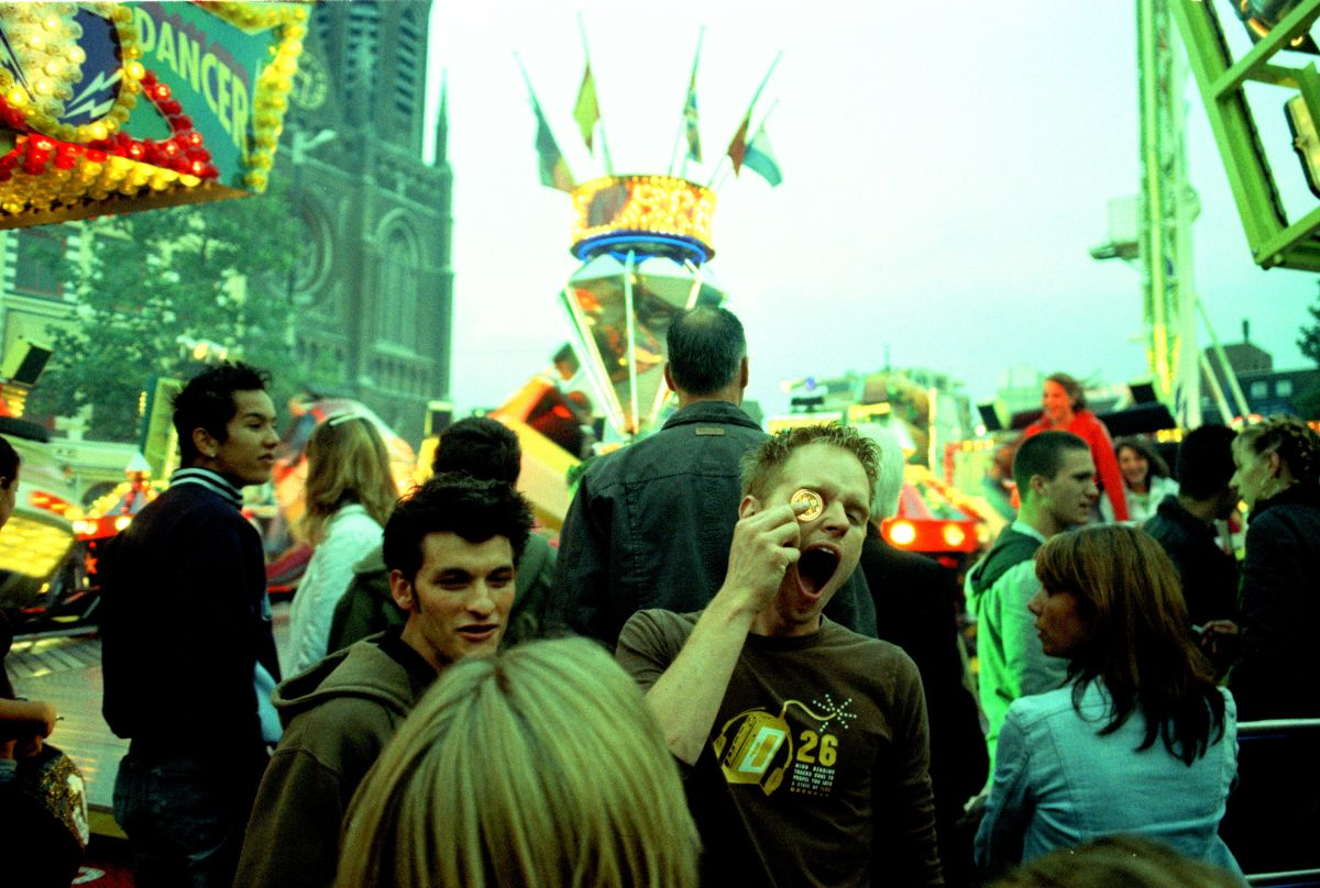 Tilburgse kermis 2005